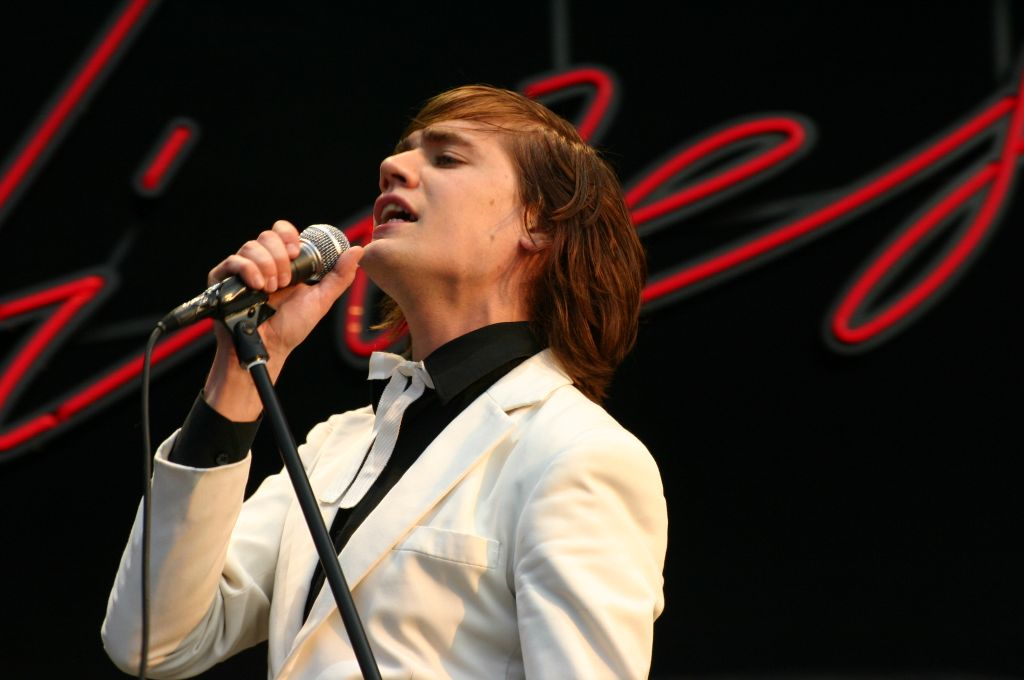 The Hives: Sänger "Howlin'" Pelle Almqvist beim Southside Festival 2004